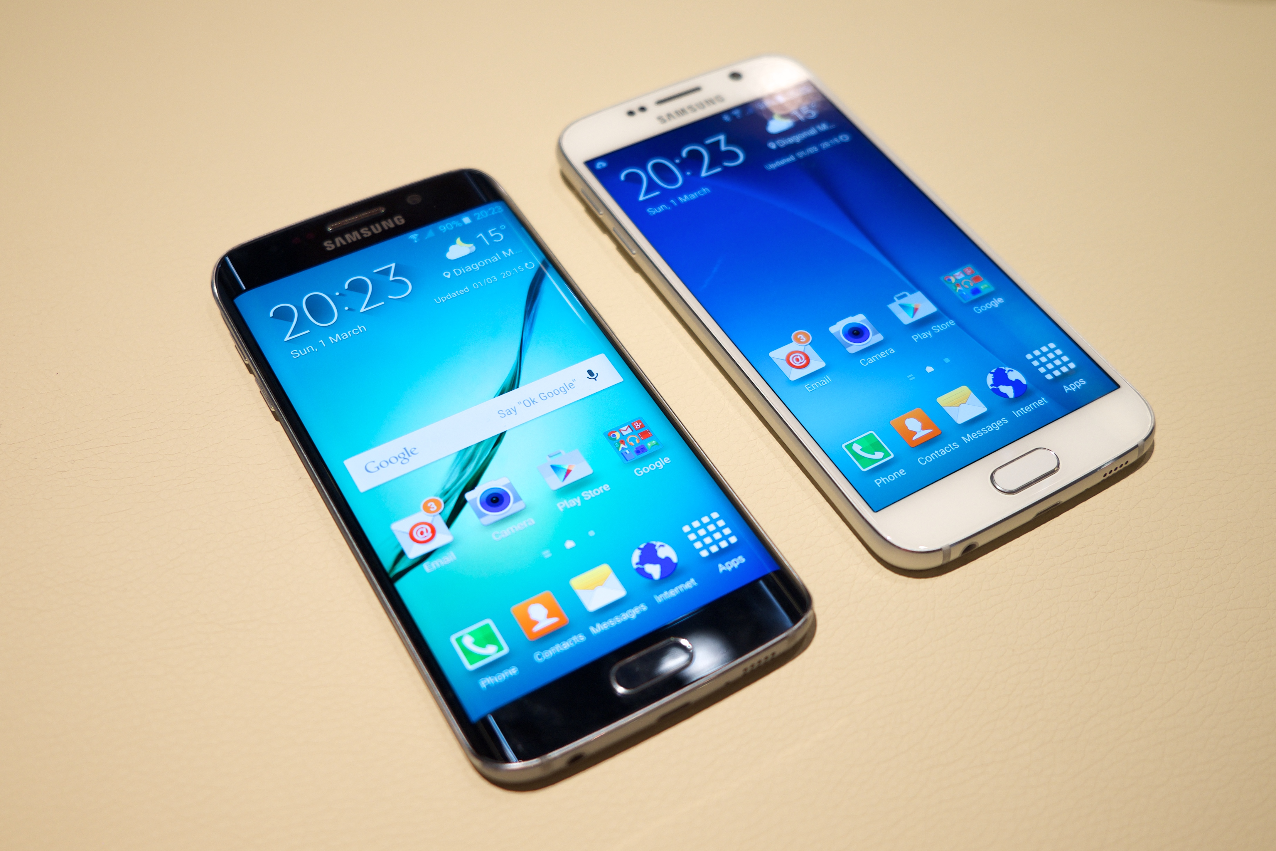 Samsung Galaxy S6 Edge